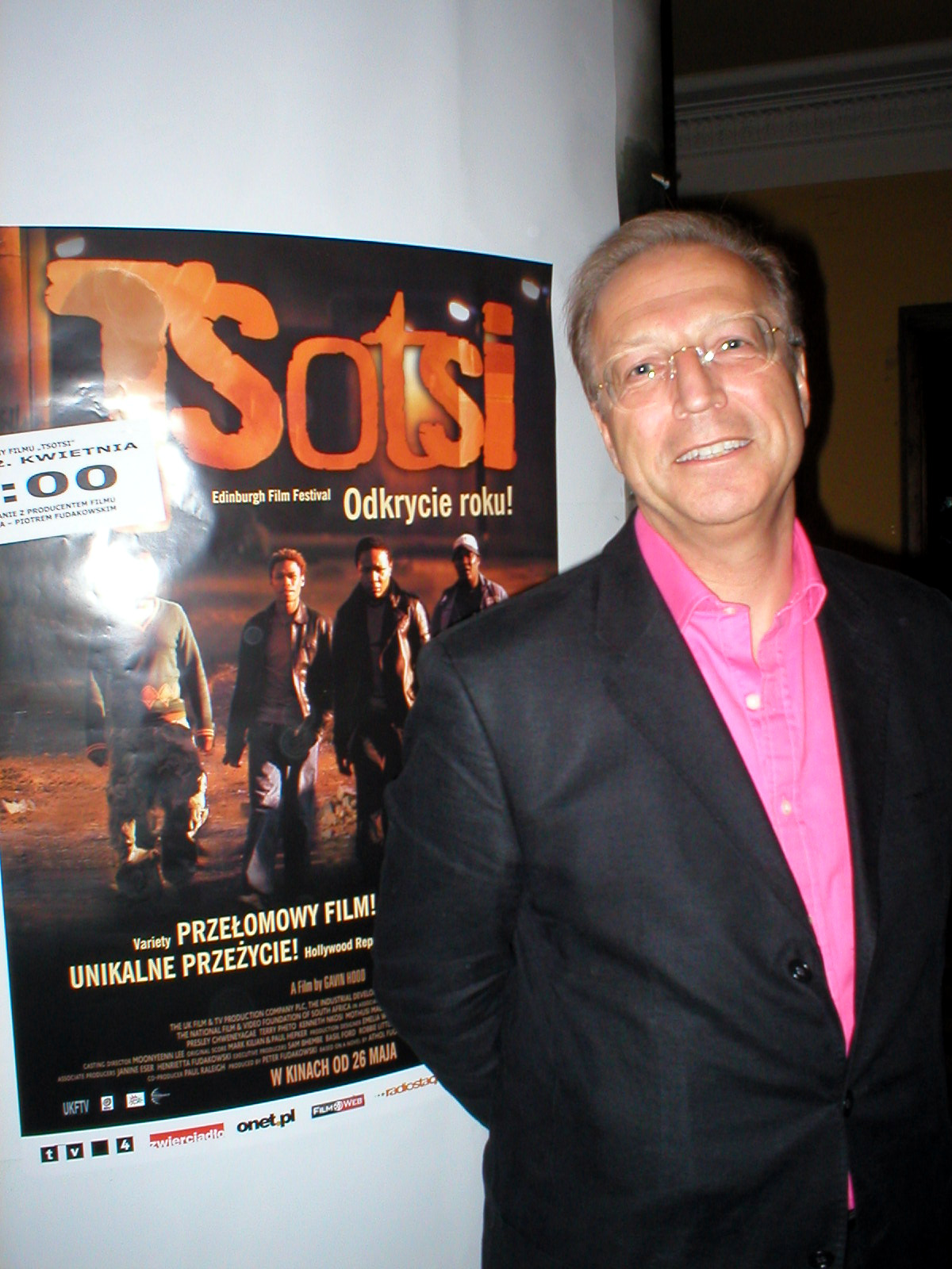 Producent Piotr Fudakowski w dniu pokazu przedpremierowego fimu w Zakopanem 23 kwietnia 2006 r.